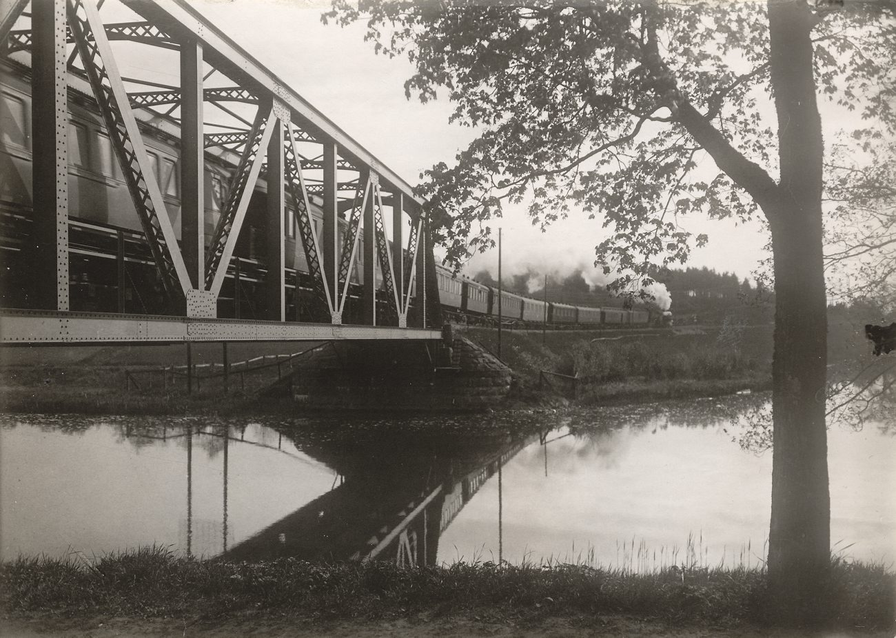 DIG92875 Nyköpingsån där den skäres av Statens Järnvägar vid Nyköping. Railway bridge over the river at Nyköping, Sweden. Photo: OKänd/ Unknown.